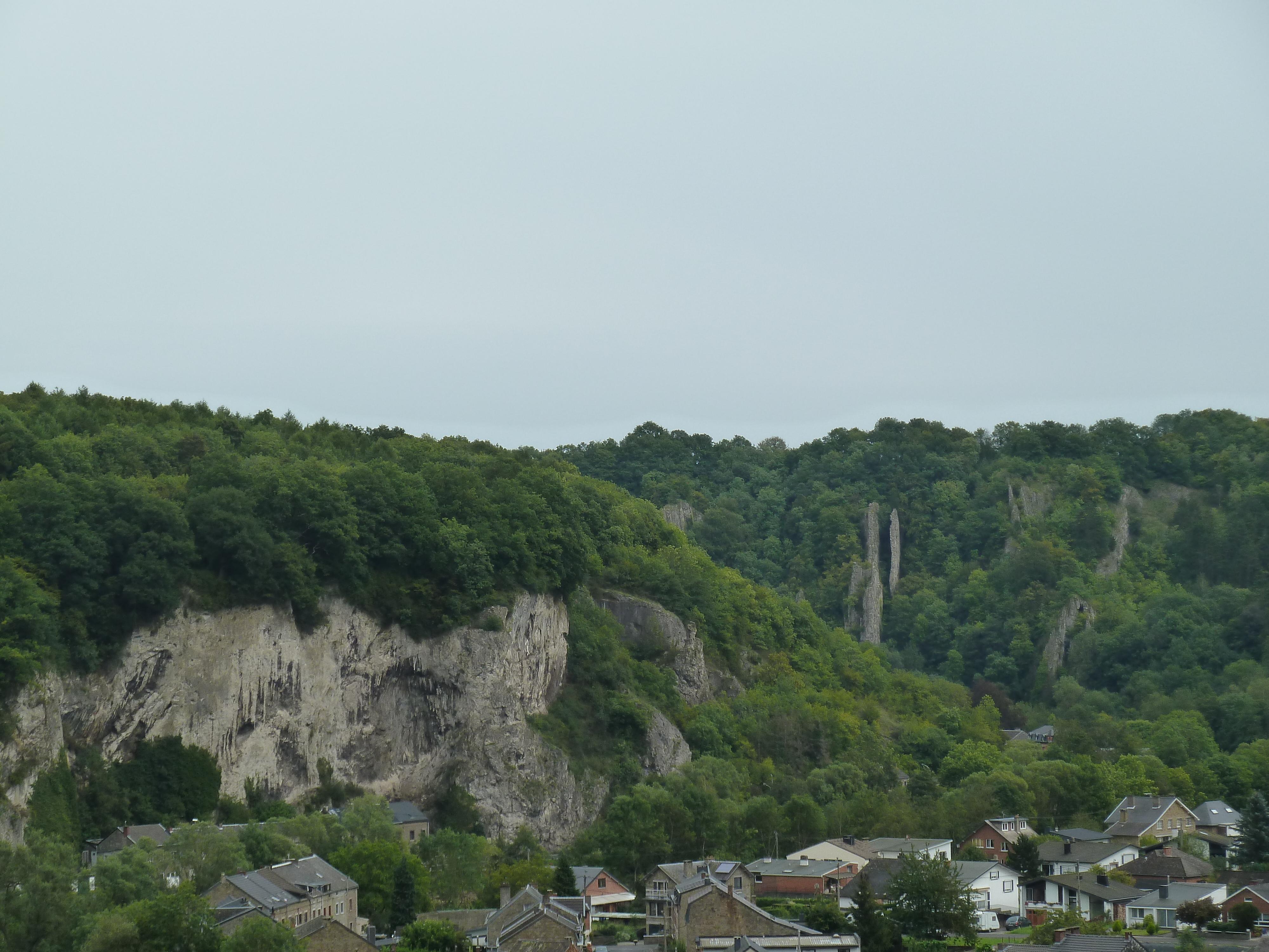 Rotsen van de Vignoble + Rotsen van de Tartines, Comblain-au-Pont, België